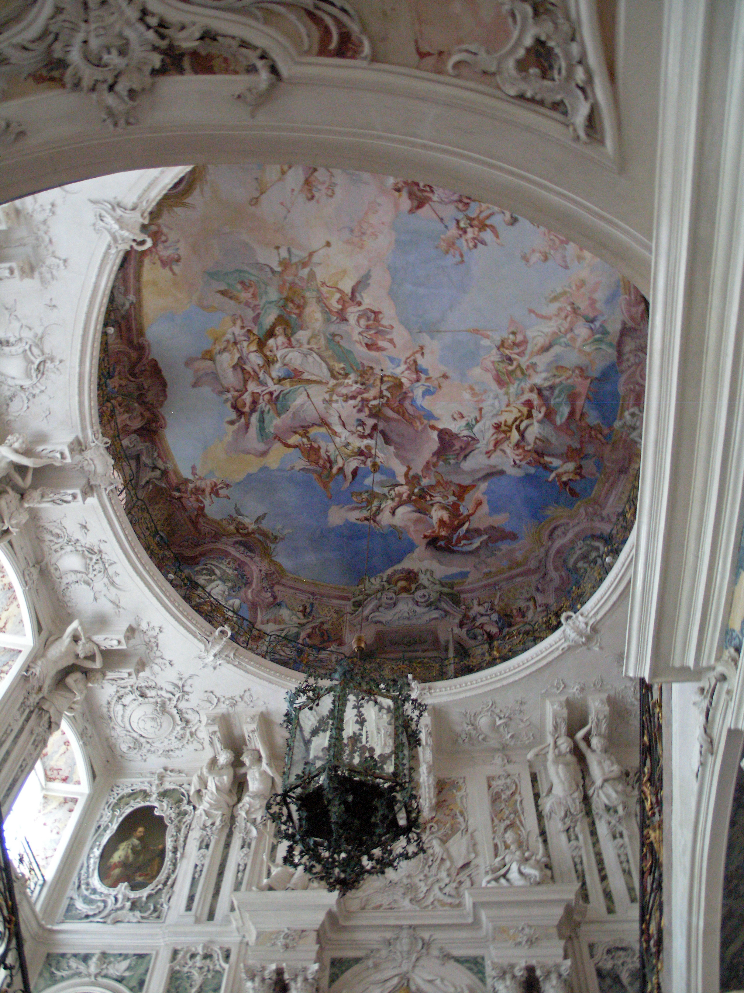 Потолок парадной лестницы дворца Аугустусбург (Брюль, Северный Рейн-Вестфалия)